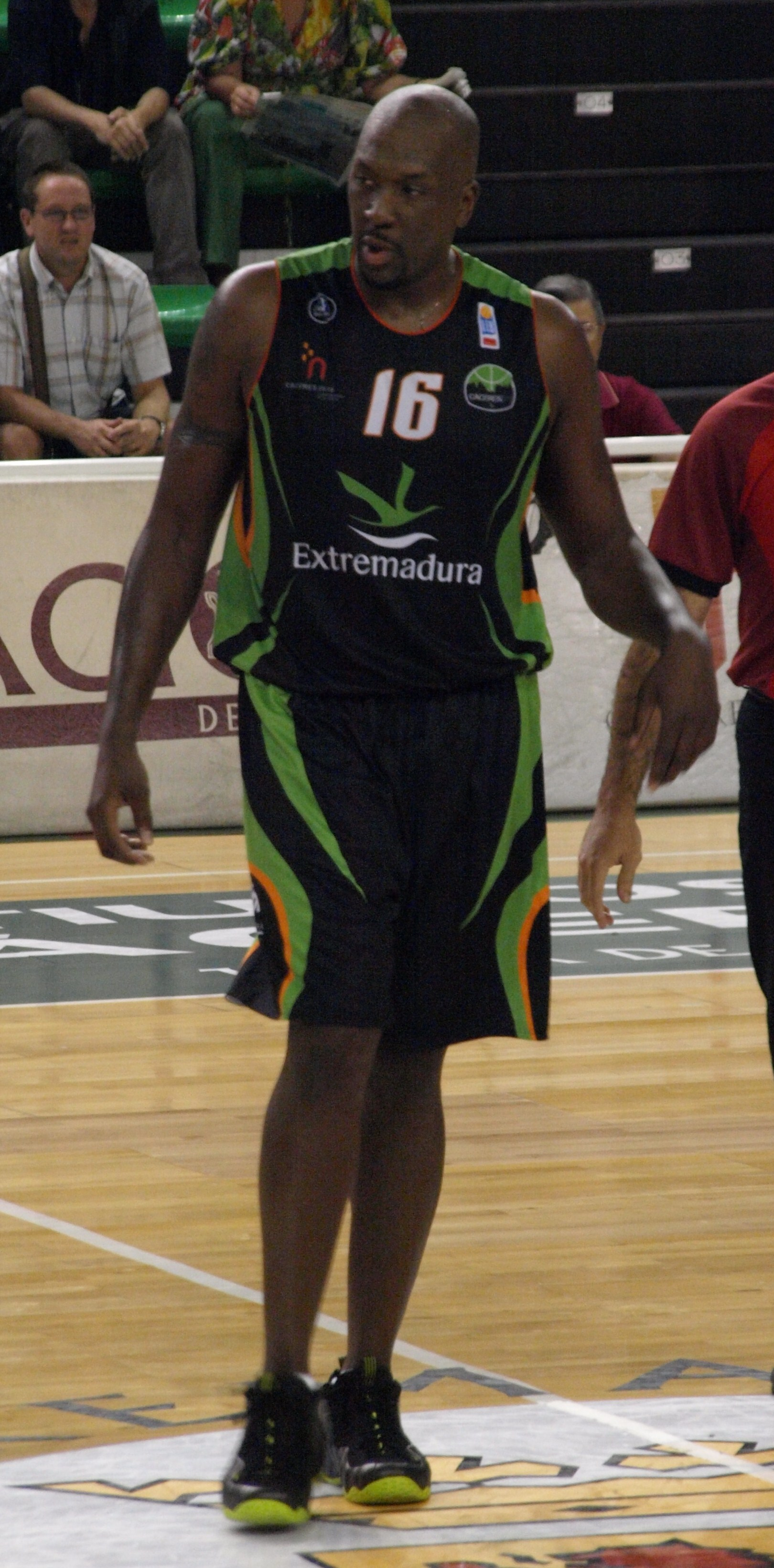 Harper Williams con la camiseta del Cáceres 2016 en el primer partido de la temporada 2008-09 disputado en el Pabellón Multiusos "Ciudad de Cáceres".